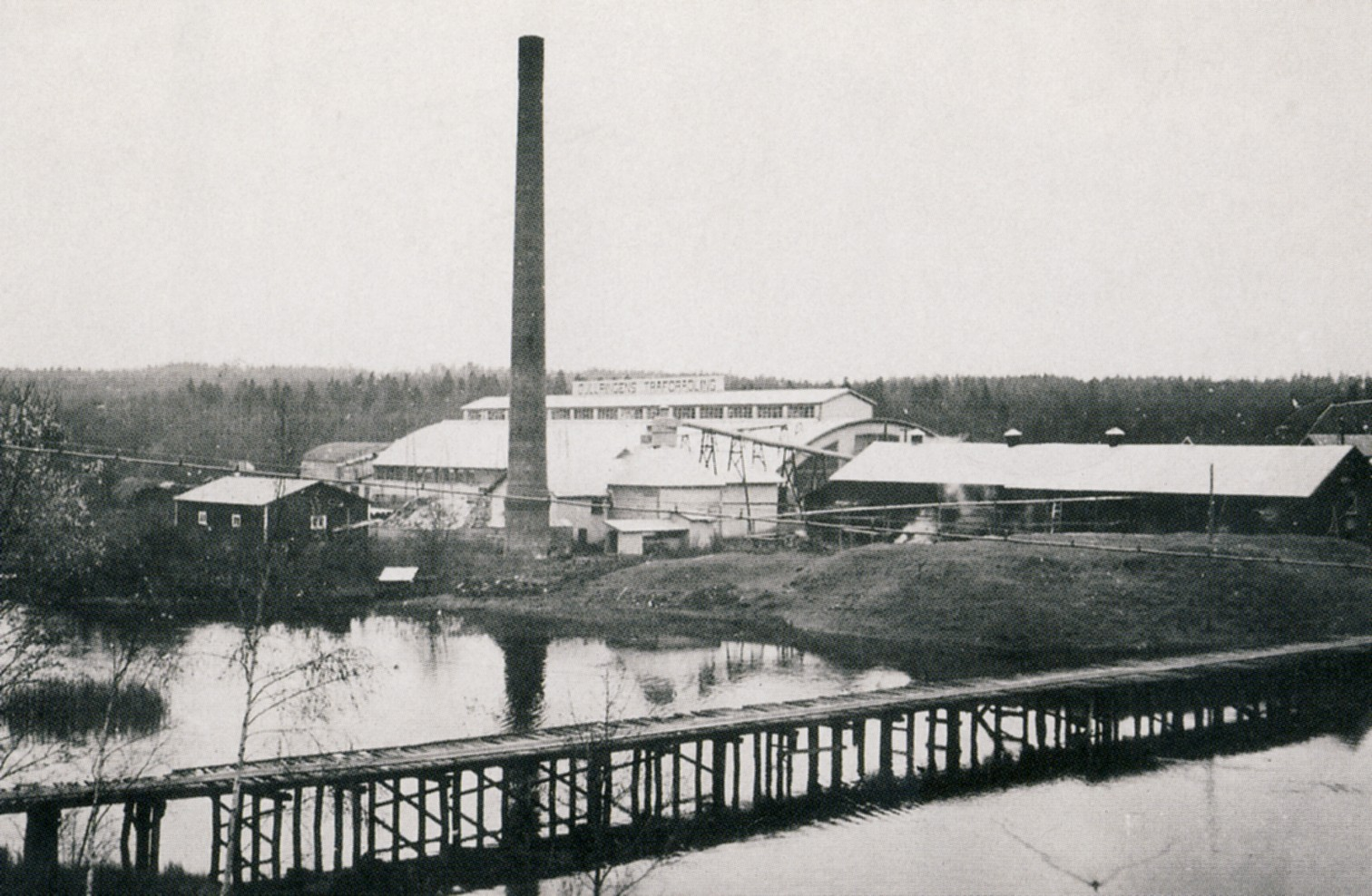 Gullringshus fabrik i Gullringen på 1930-talet